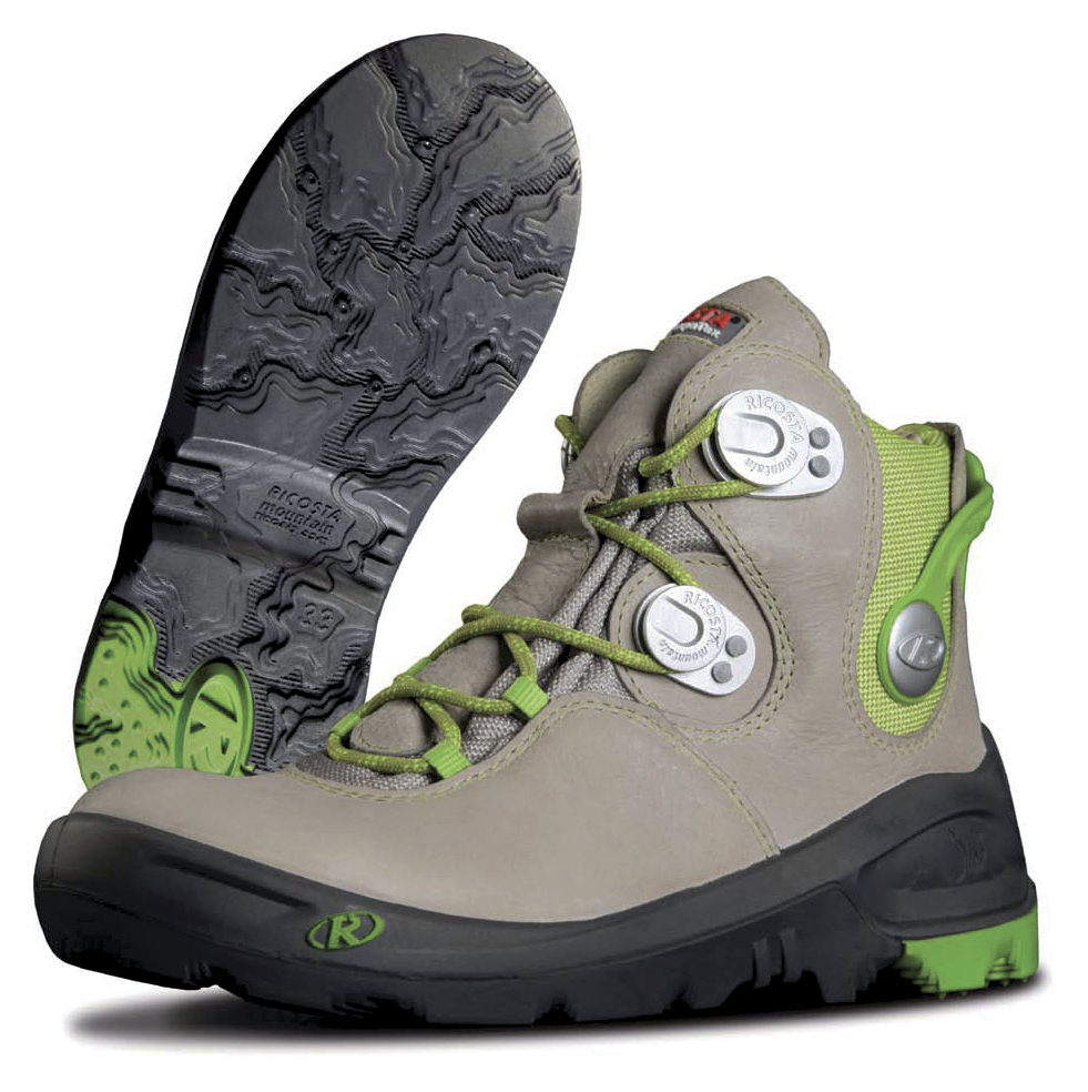 Ricosta Mountain